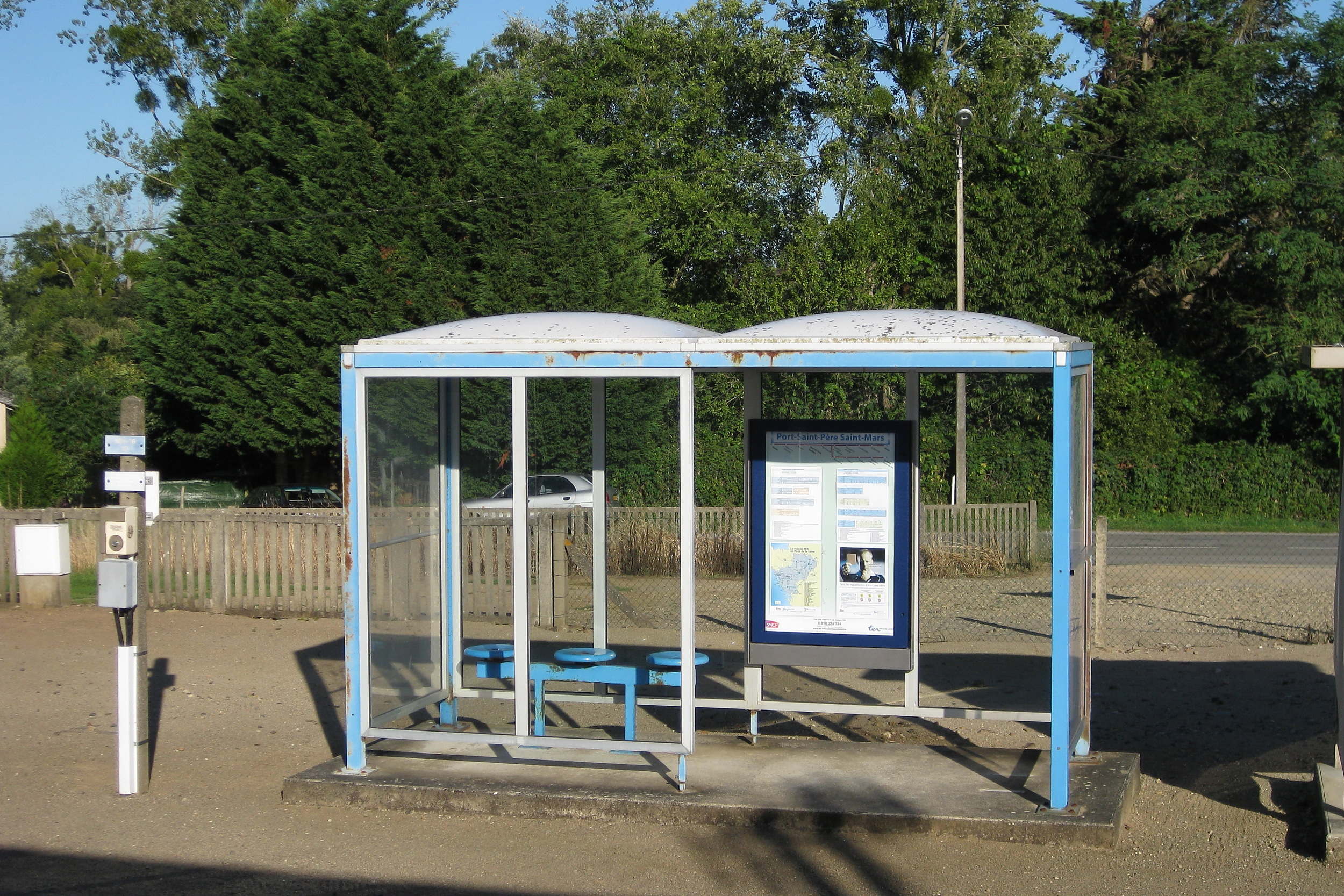 Abri de quai de la gare de Port-Saint-Père - Saint-Mars